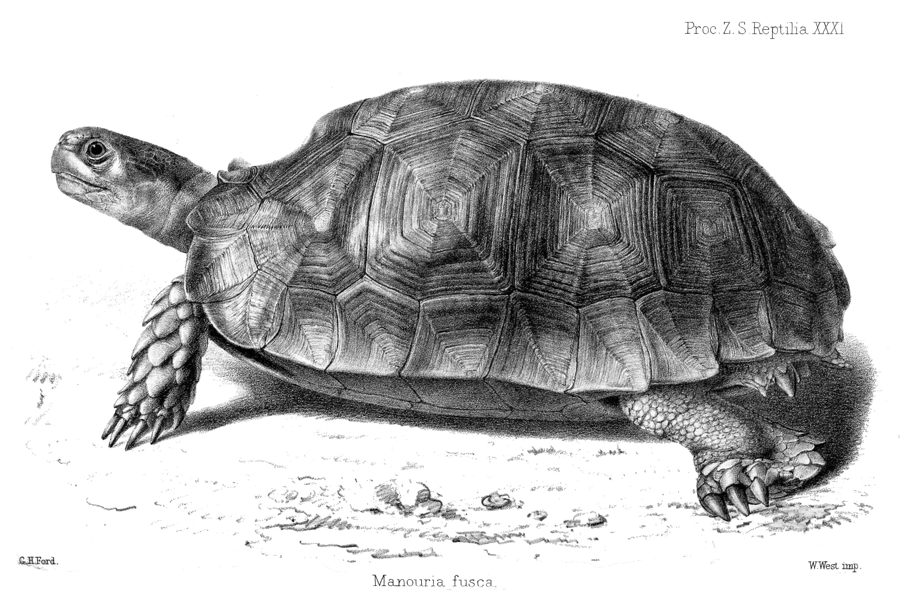 Manouria fusca = M. emys